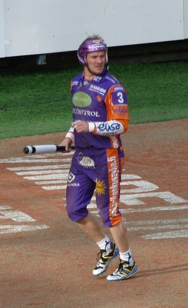 Antti Hartikainen ottelussa Vimpelin Veto - Sotkamon Jymy (19.7.2015).